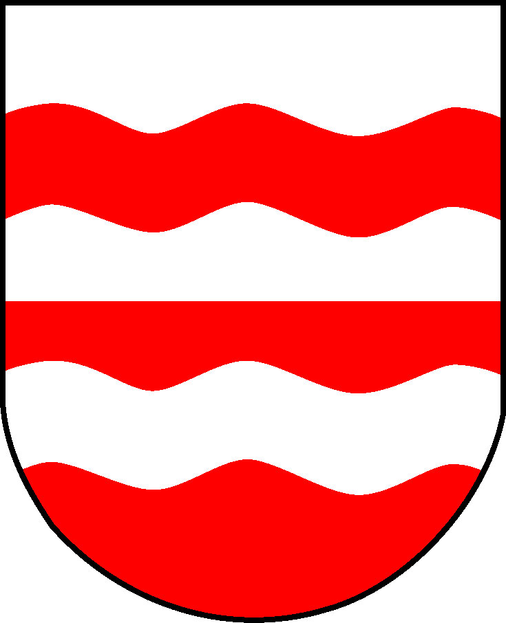 Blason de la ville de Morges(CH)